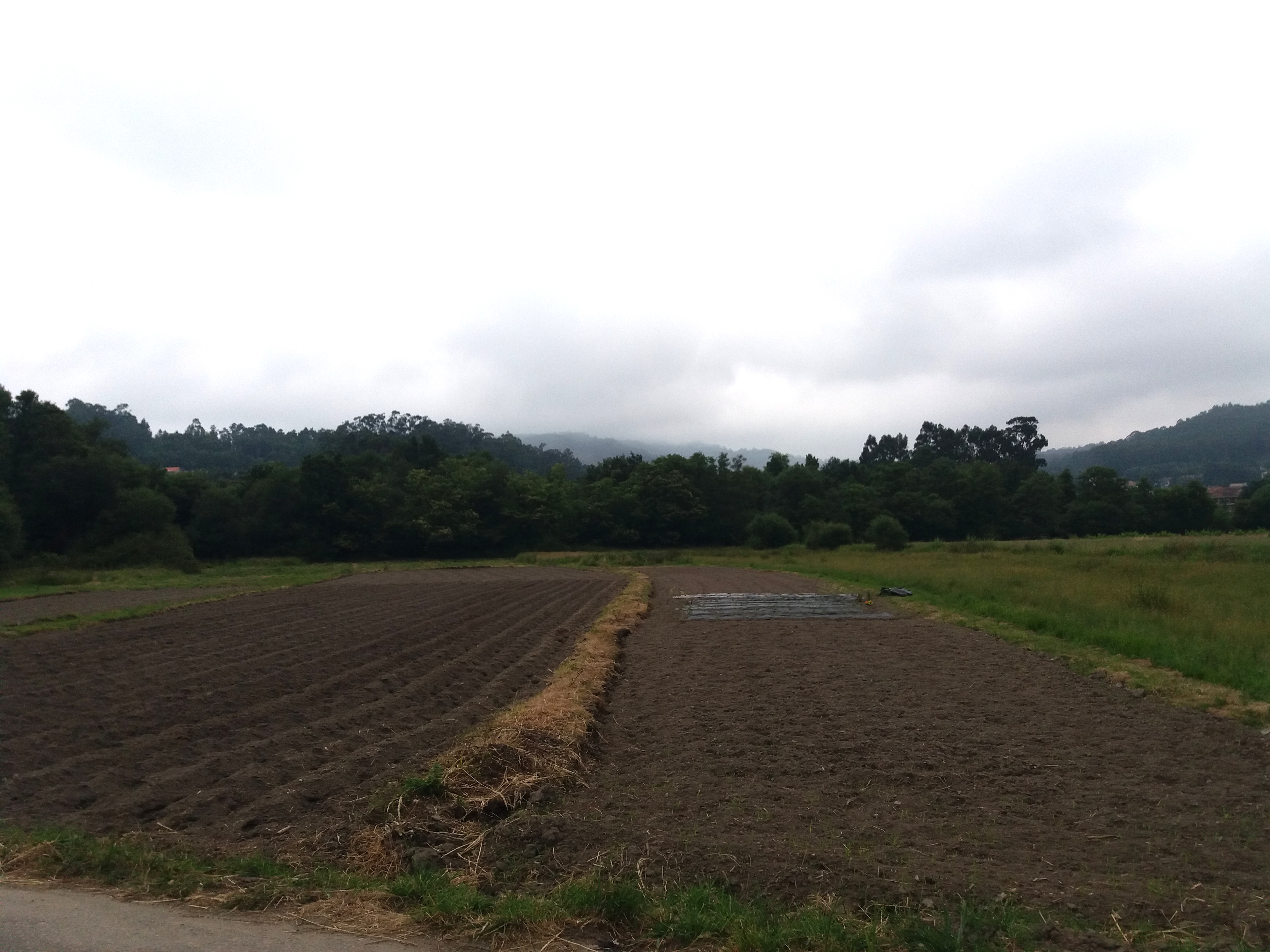 Campos de cultivos nas Ribeiras de San Bieito, no Campo das Bestas, Mañufe, Gondomar